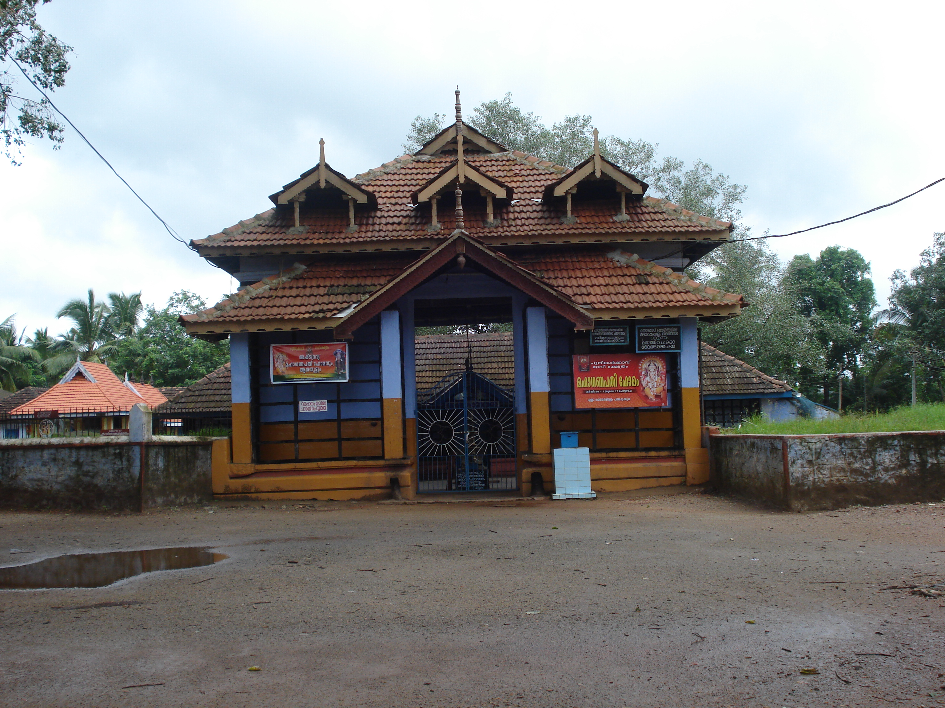 പൂനിലാർക്കവ്ഭഗവതിക്ഷേത്രം, കൊടകര